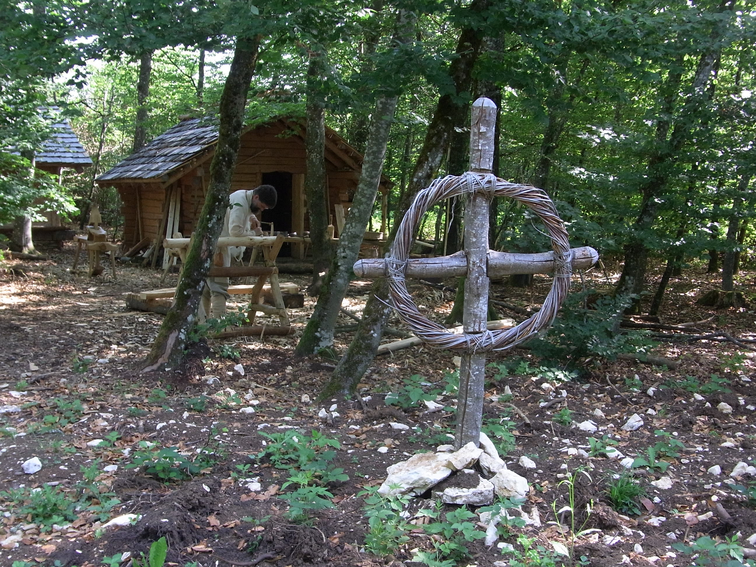 Campus Galli: Gallus-Eremitage